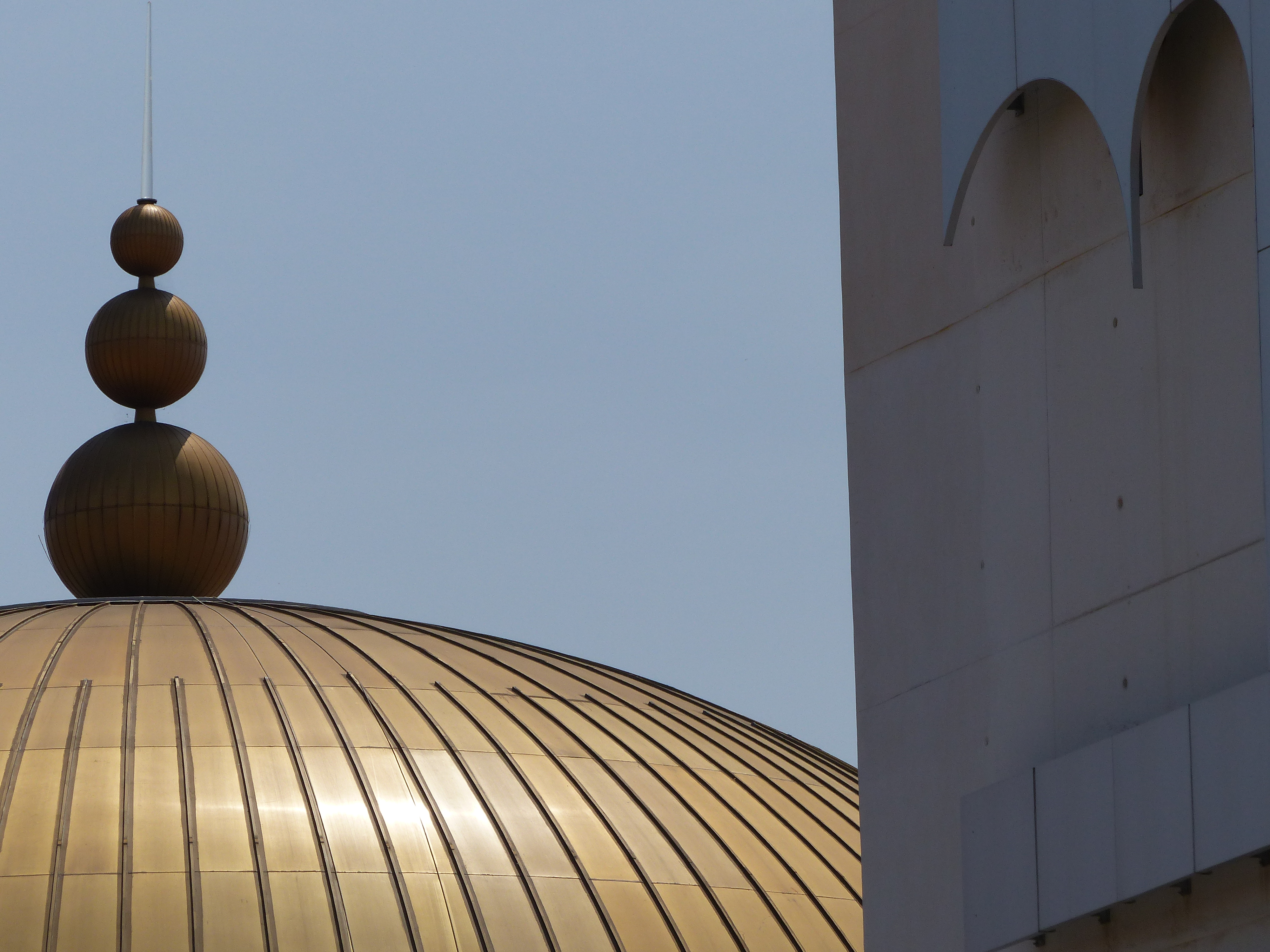 Palacio de Congresos y Exposiciones, detalle, Sevilla, España, 2015